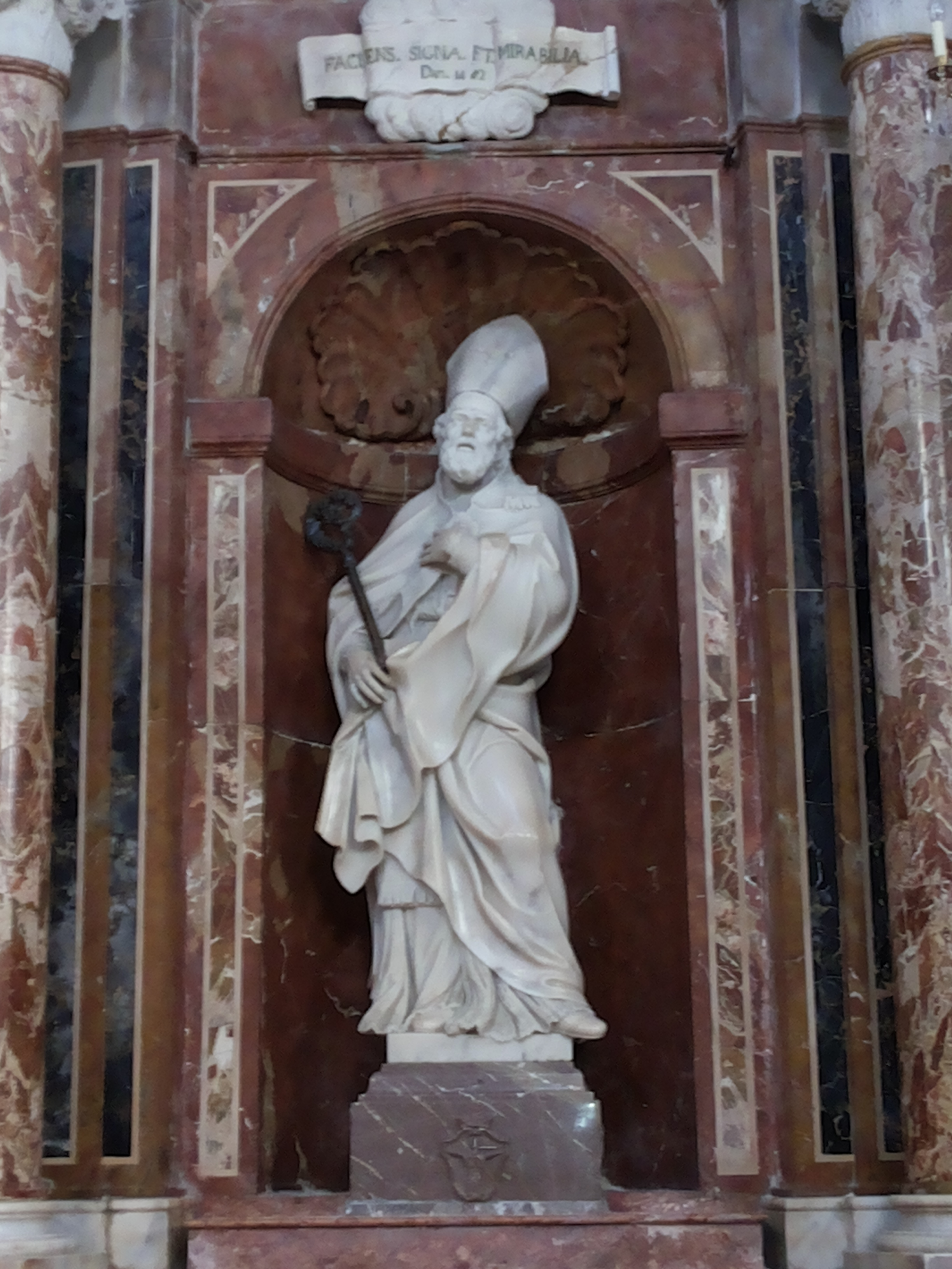 Chiesa di Sant'Oliva (Alcamo) - Statua di Sant'Eligio. Opera di Filippo Pennino, in marmo bianco di Carrara. Altezza: 2,14 m. (fonte informazioni